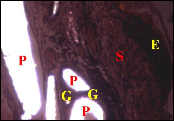 Réaction à cellules géantes provoquée par une prothèse fragmentée dans la paroi d'un cholestéatome. Vue en lumière polarisée